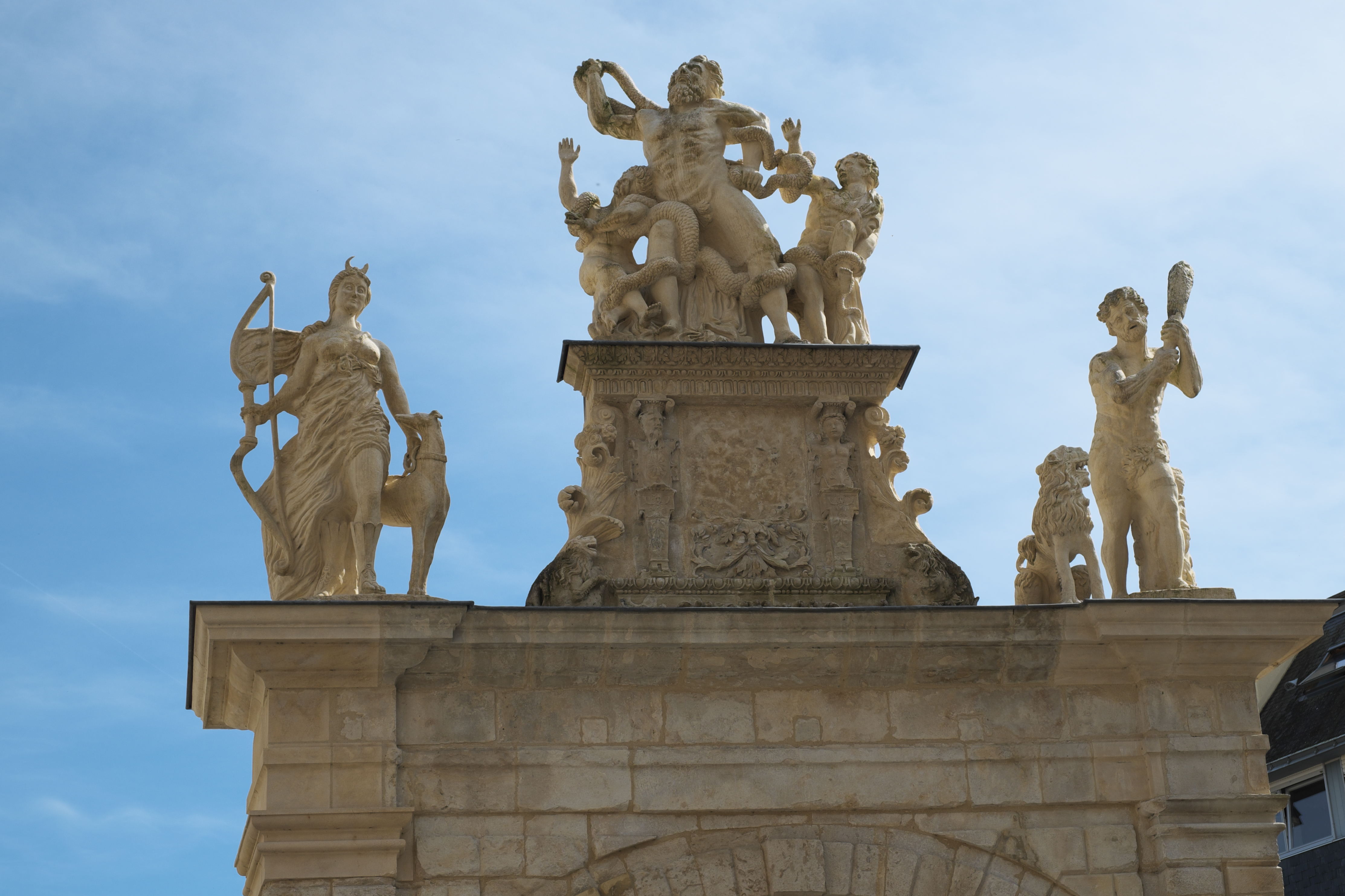 Hôtel Château-Gaillard, 6 rue Pont-aux-Chèvres, in Fontenay-le-Comte im Département Vendée (Pays de la Loire/Frankreich), Laokoon-Gruppe, links Diana, rechts Herkules